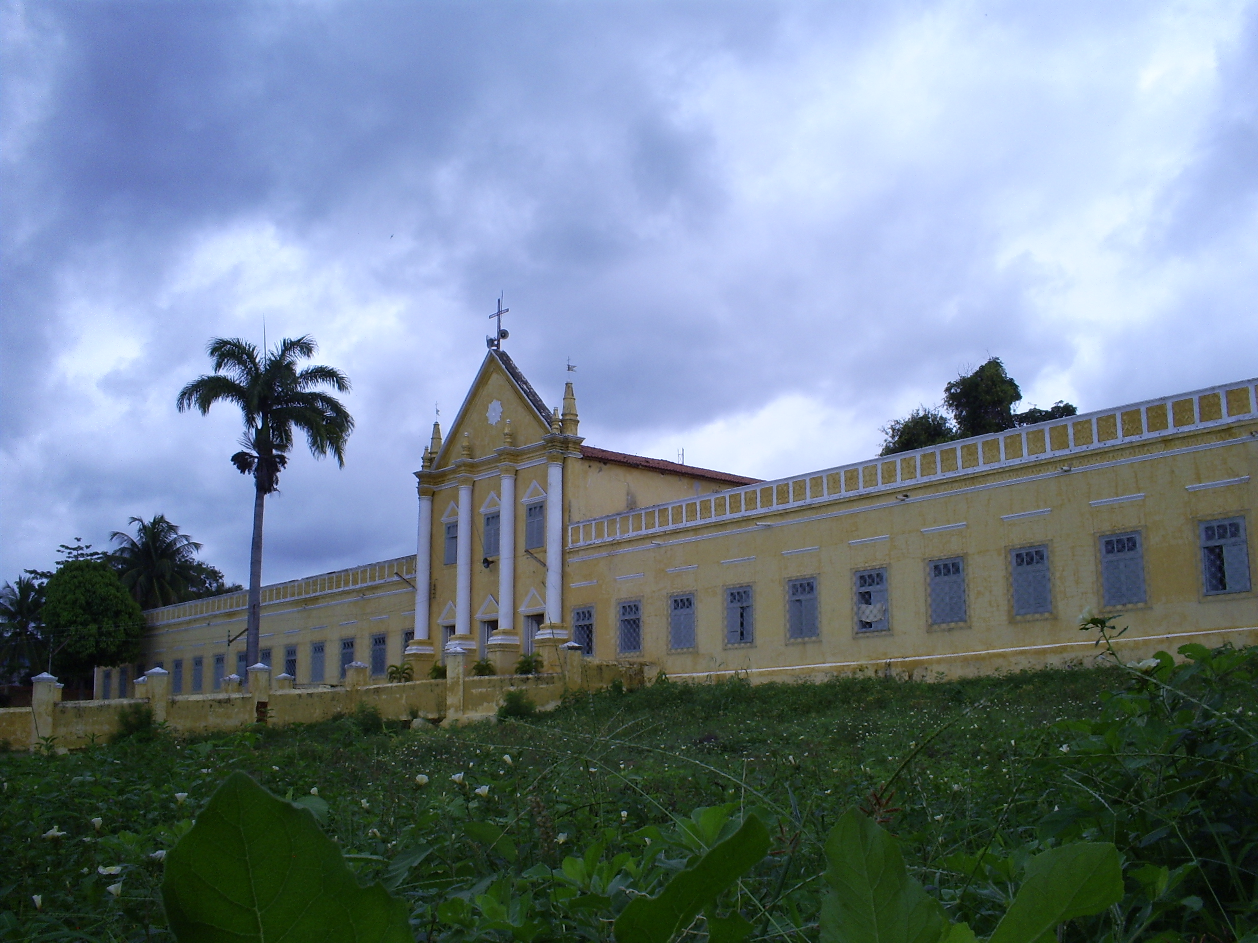 Seminário São José, Crato, Ceará